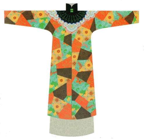 Kleid im Reisfeld-Stil